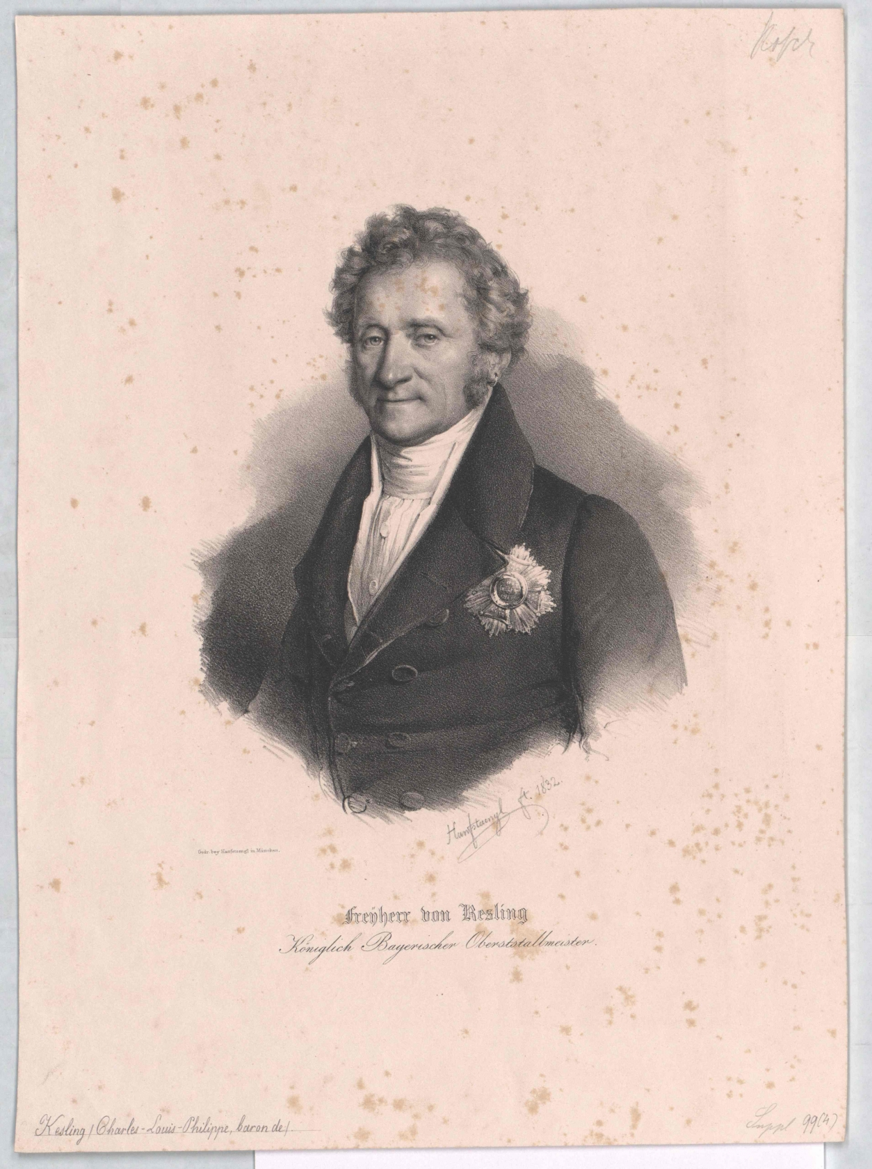 Gravure représentant le grand-chambellan de Bavière